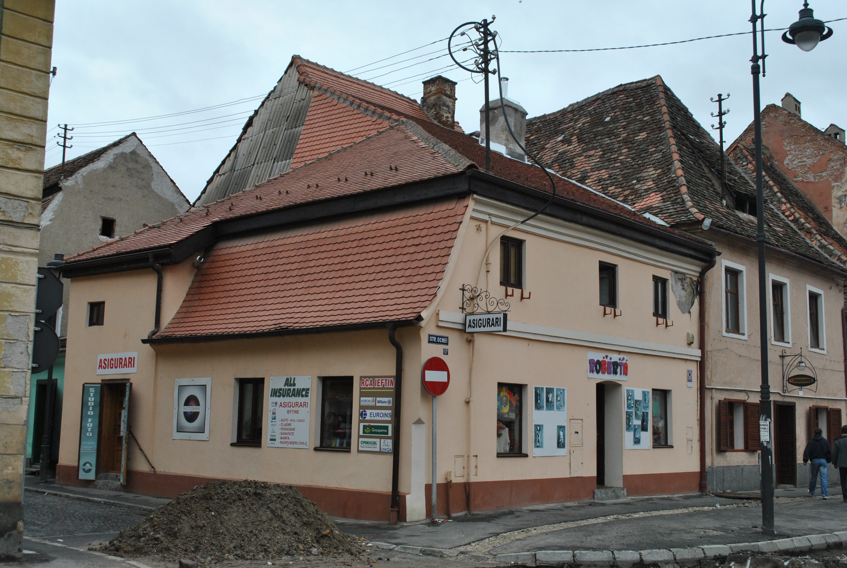 Casă, sec. XVII - XVIII